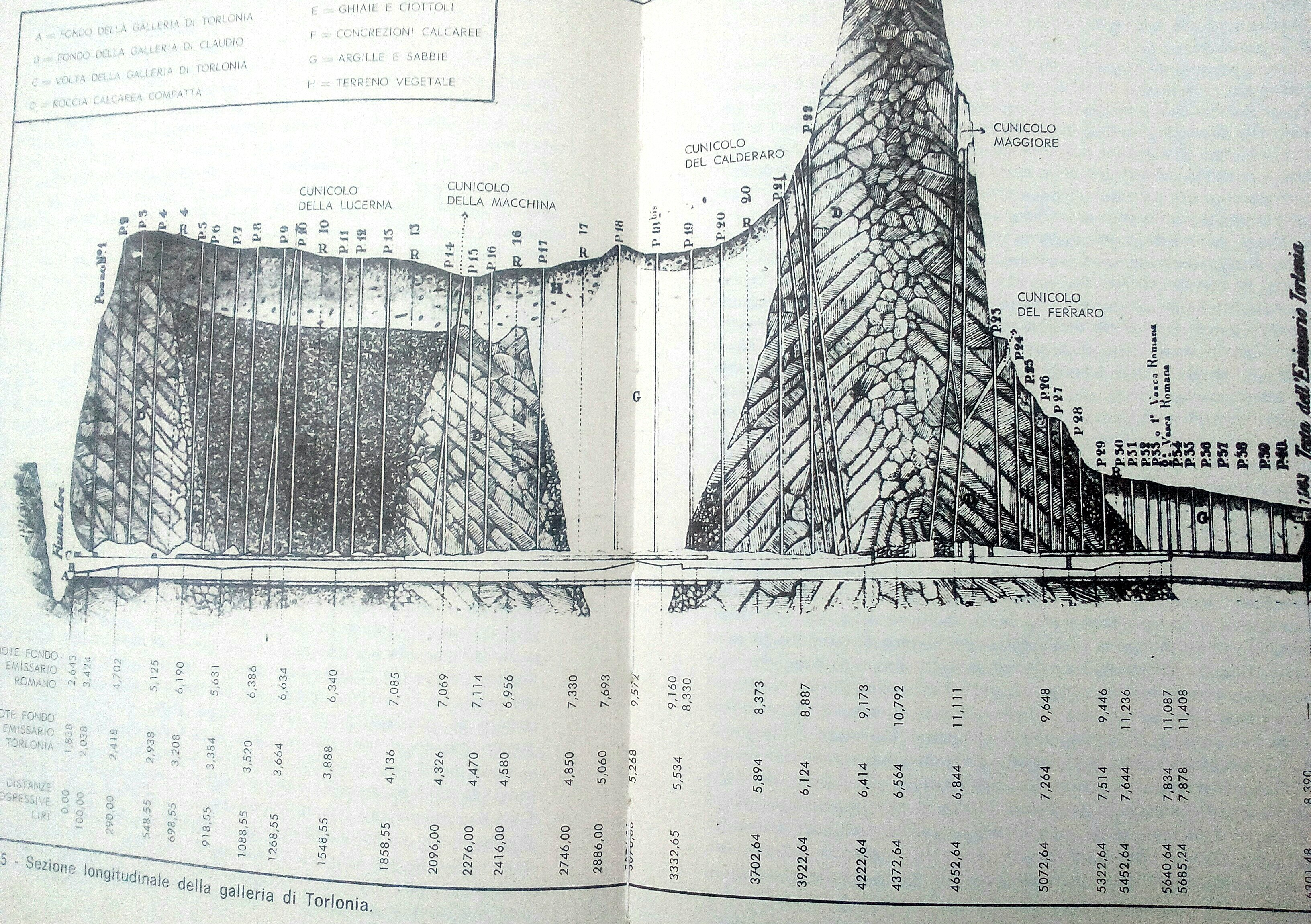 Sezione longitudinale della galleria Torlonia